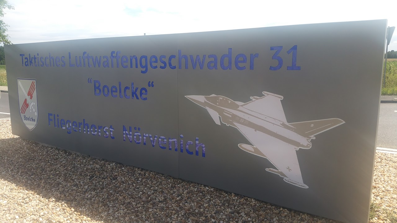 Der neugestaltete Zufahrtsschild zum Fliegerhorst